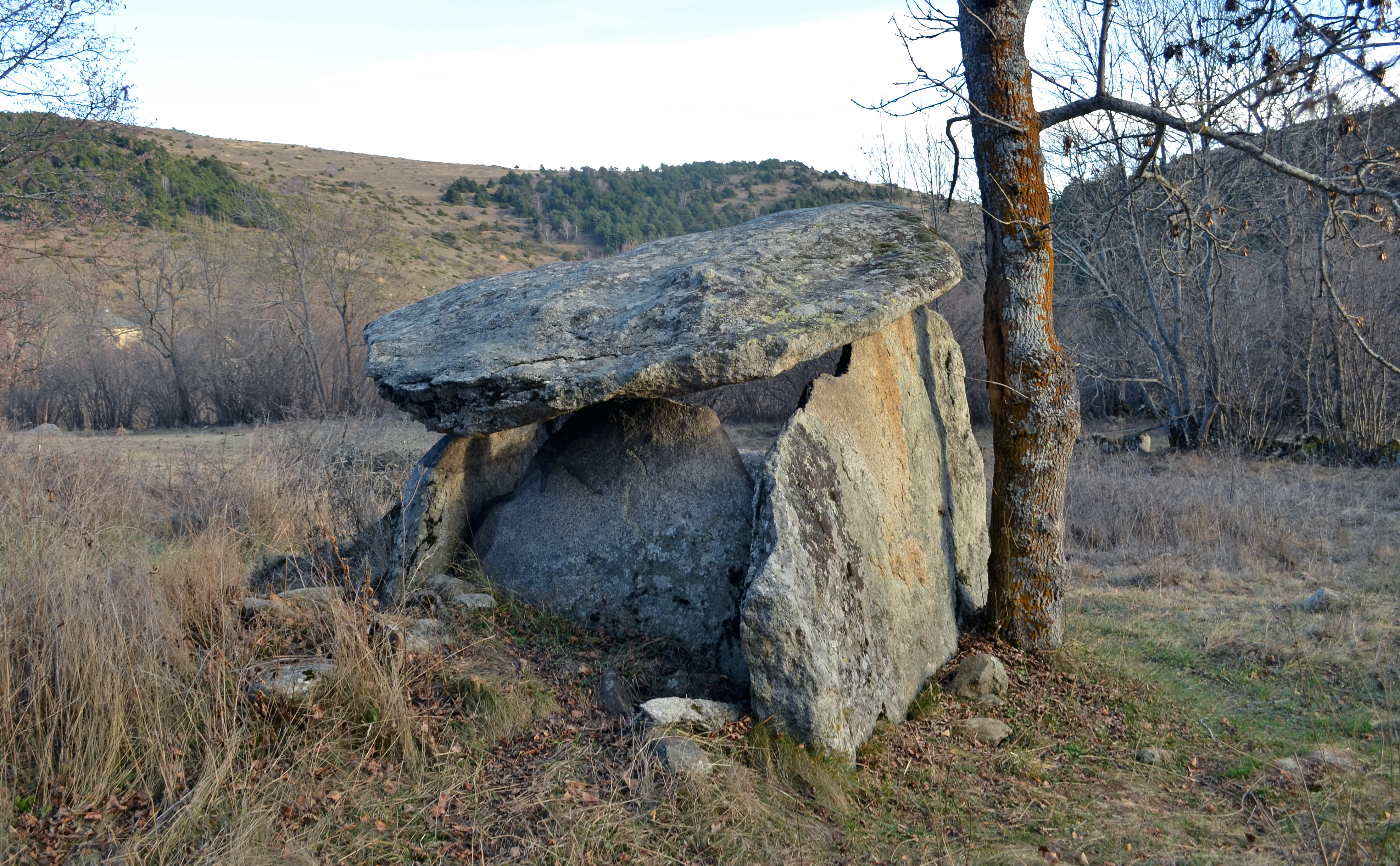 Dolmen de Bragoly ou Brangoli - Enveitg, Pyrénées-Orientales